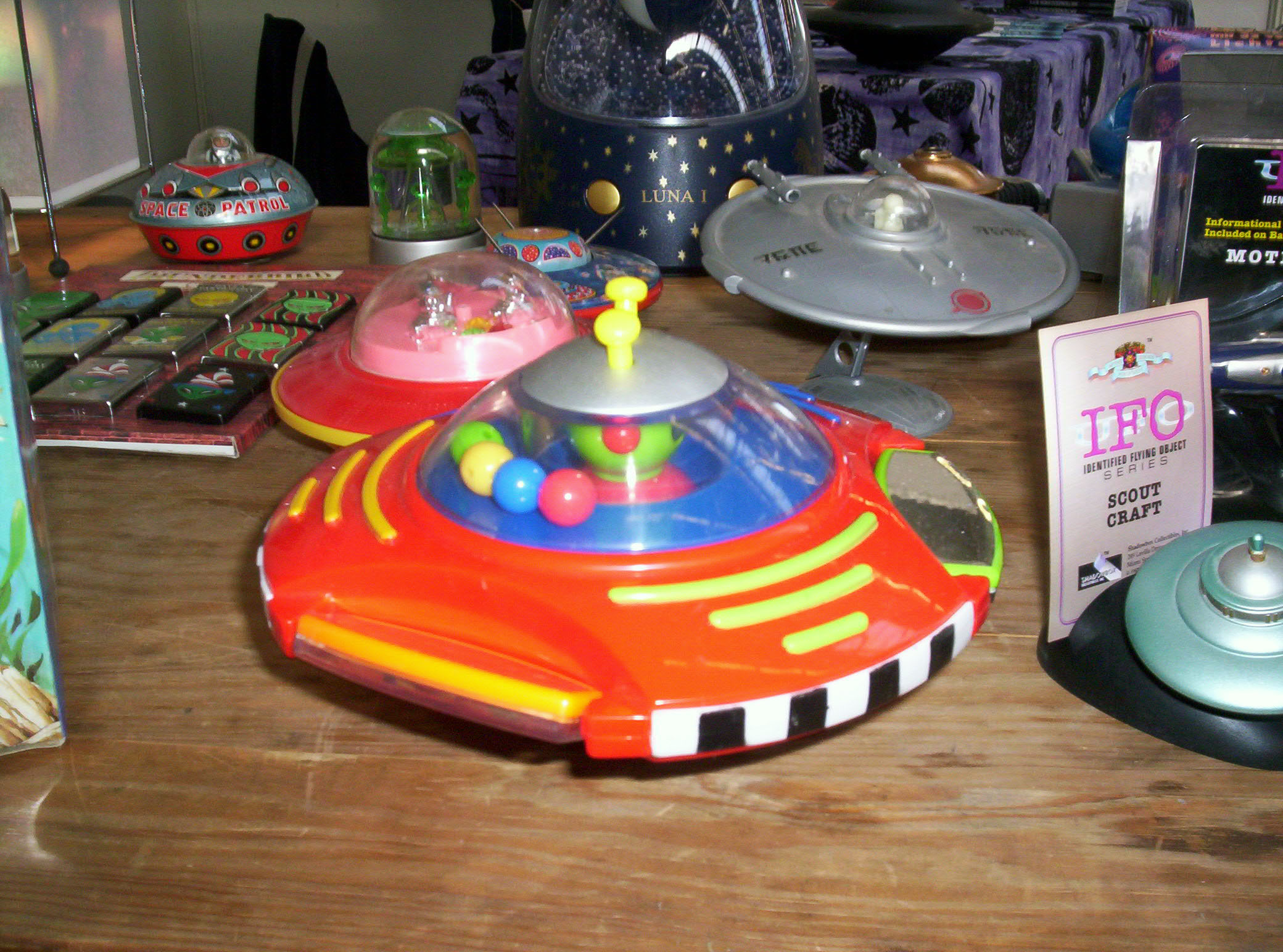 Europeen UFO Congress 2005, Châlons en Champagne, France. Les premières rencontres ufologiques, Châlons en Champagne, France, les 14, 15 et 16 octobre 2005. Détails d'un stand. Taken on october 16, 2005.